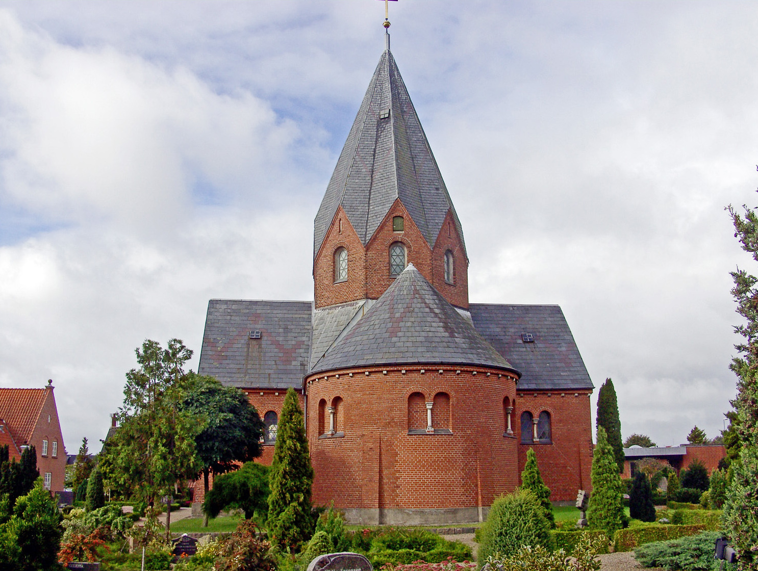 fra vest